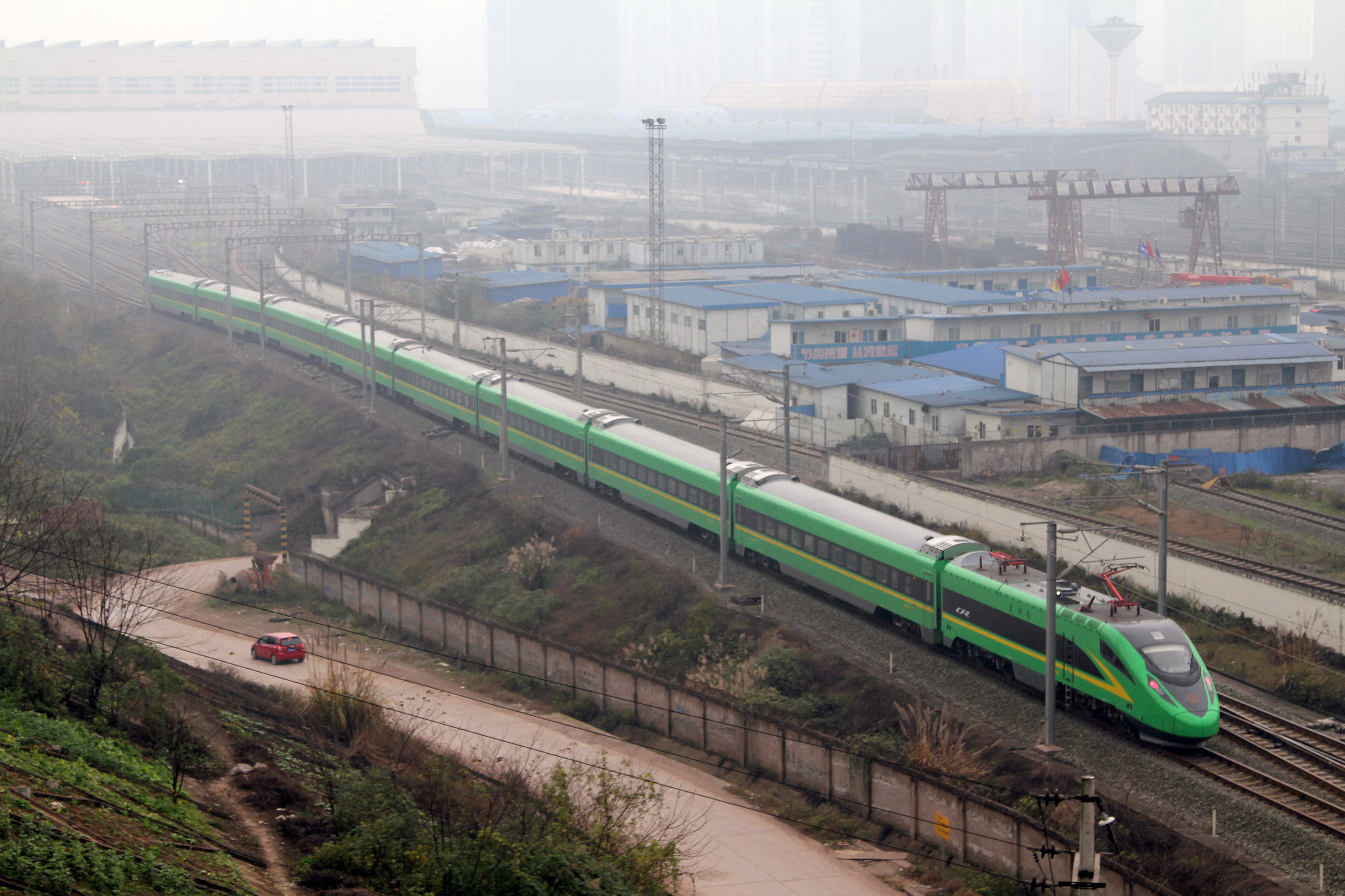 中文（中国大陆）: 复兴号CR200J型电力动车组在重庆北站北广场附近